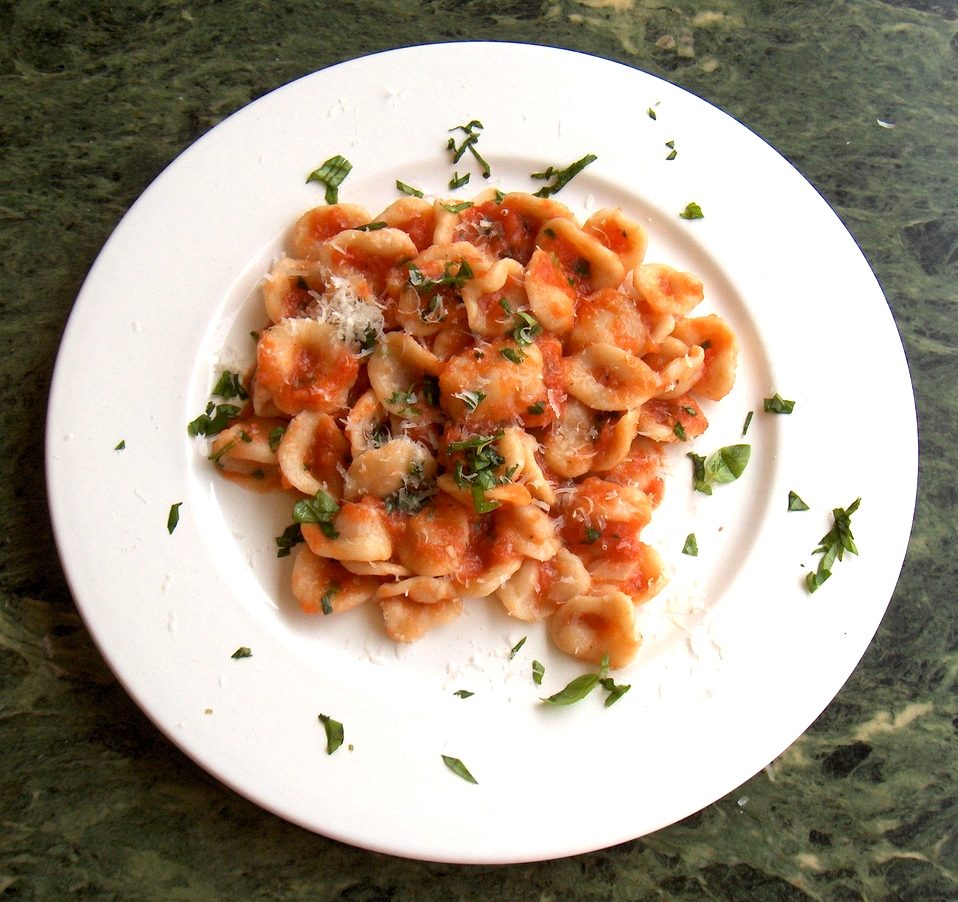 Orecchiette, italian pasta from Puglia.